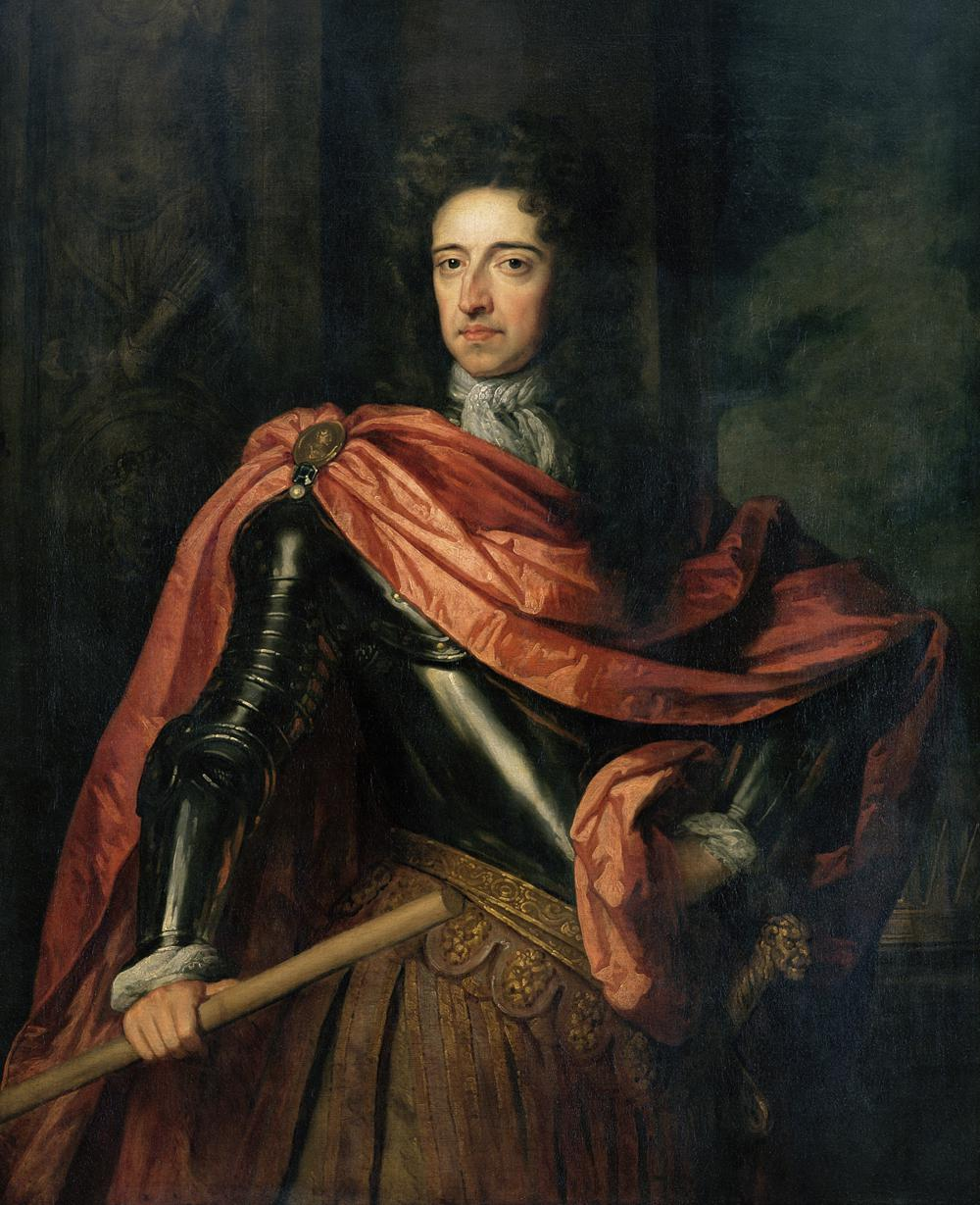 for details